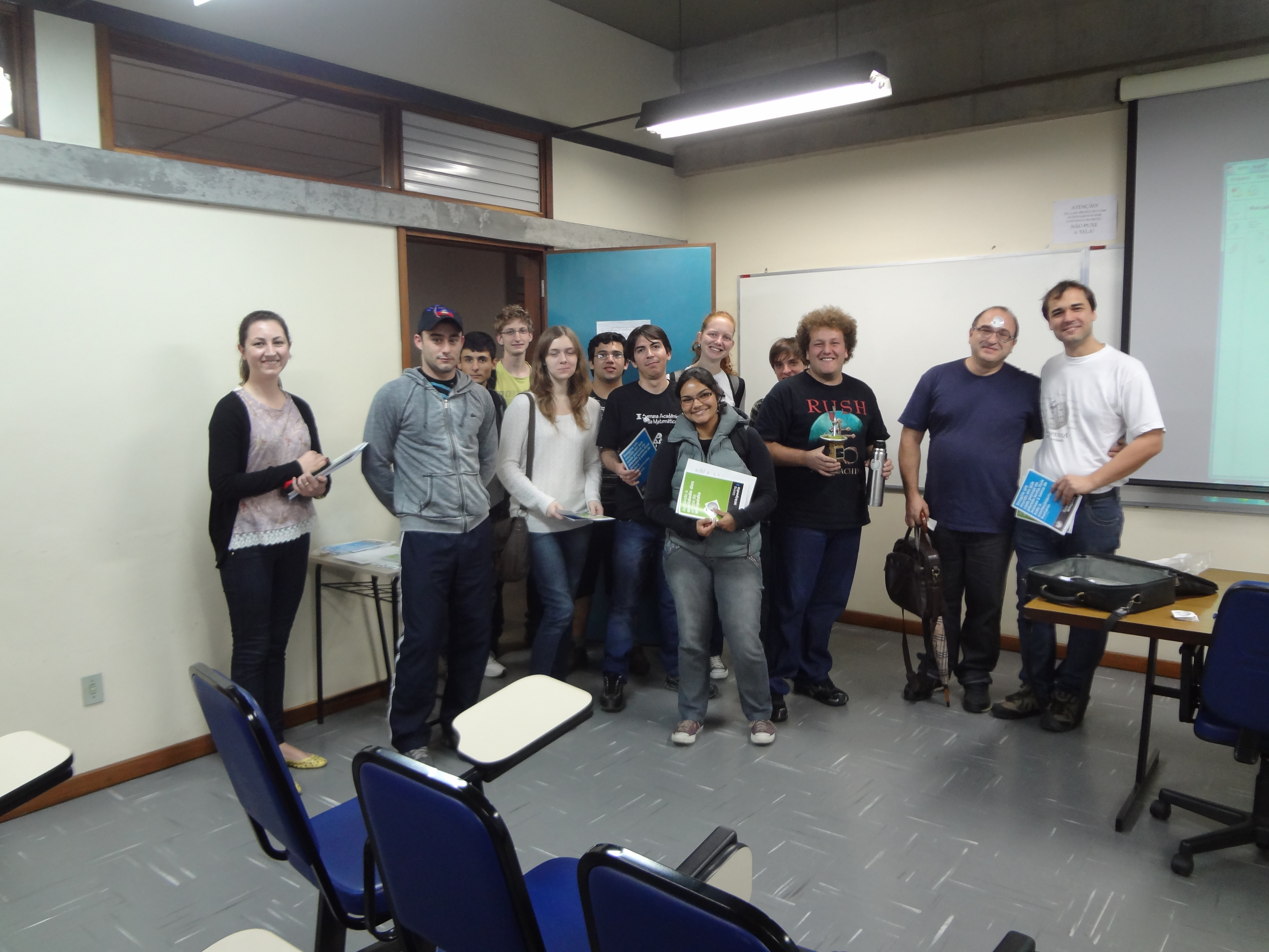 Palestra na Semana Acadêmica do Instituto de Matemática da UFRGS - 2012/2